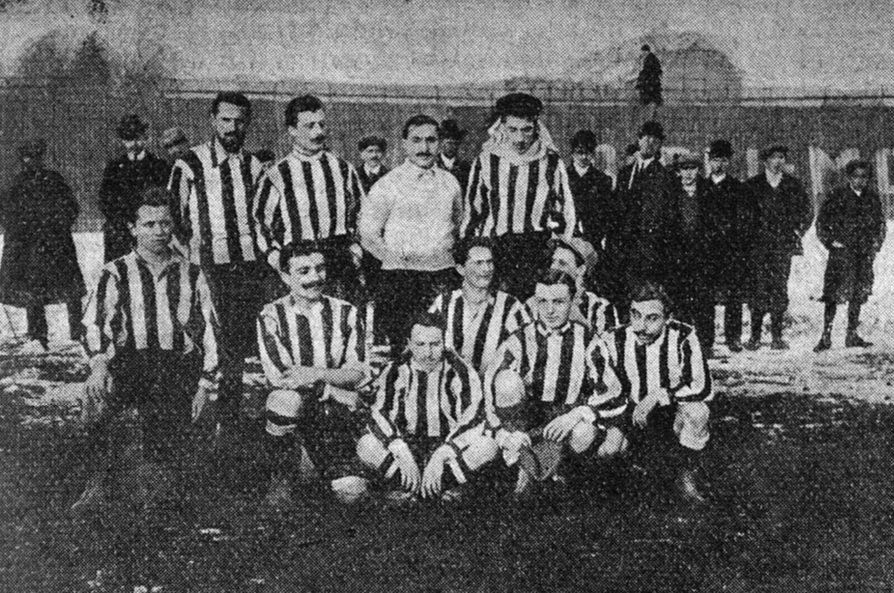 Una formazione della Juventus nella stagione 1906-07.